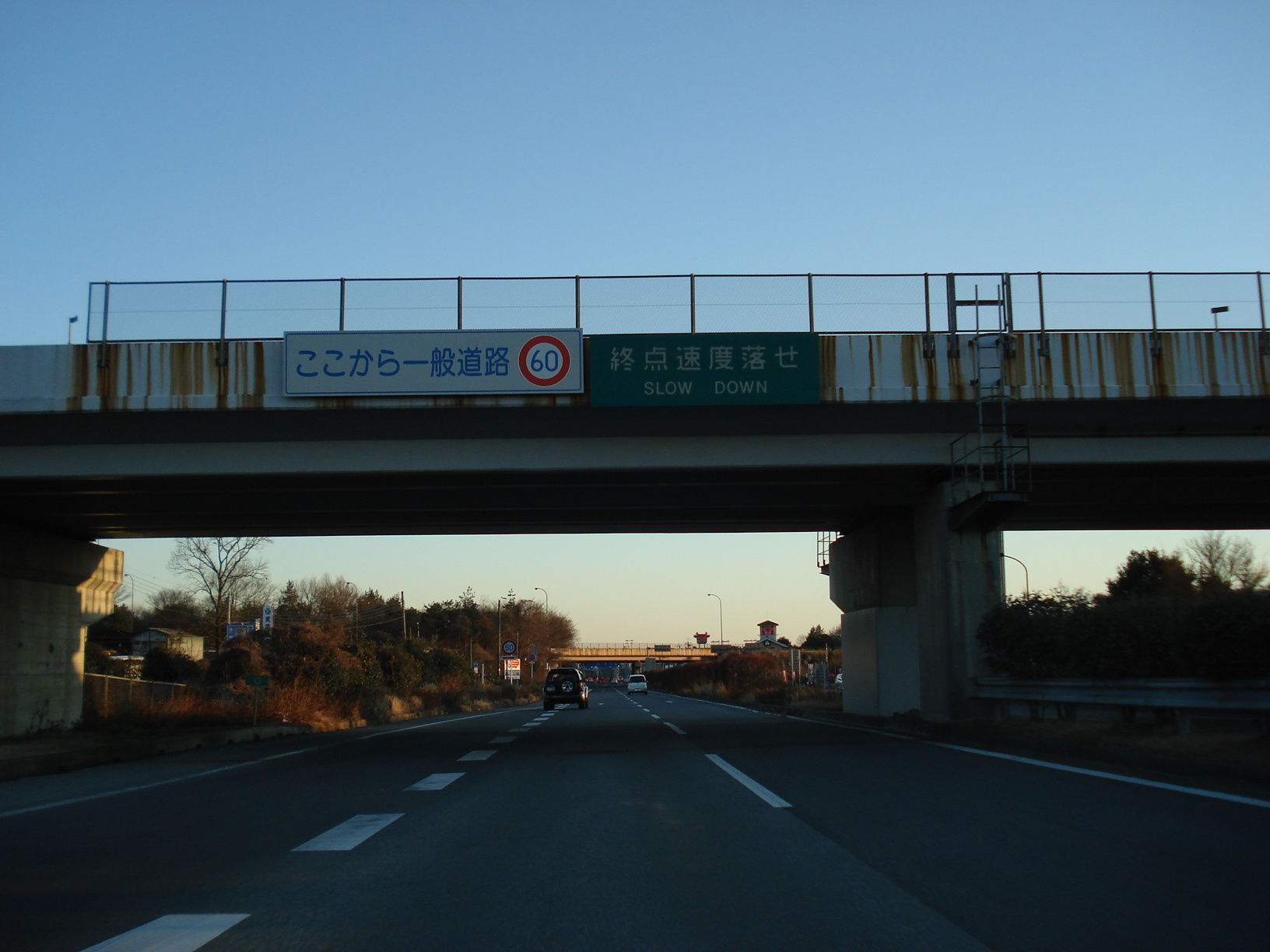 日光宇都宮道路 宇都宮インターチェンジ（日光宇都宮道路起点） 栃木県宇都宮市